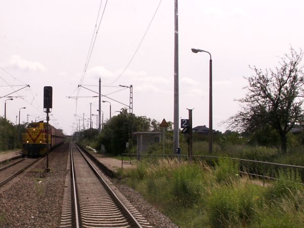 Bahnstrecken um Merseburg (Bahnhof Merseburg-Elisabethhöhe, NICHT die Bahnstrecke nach Schafstädt)